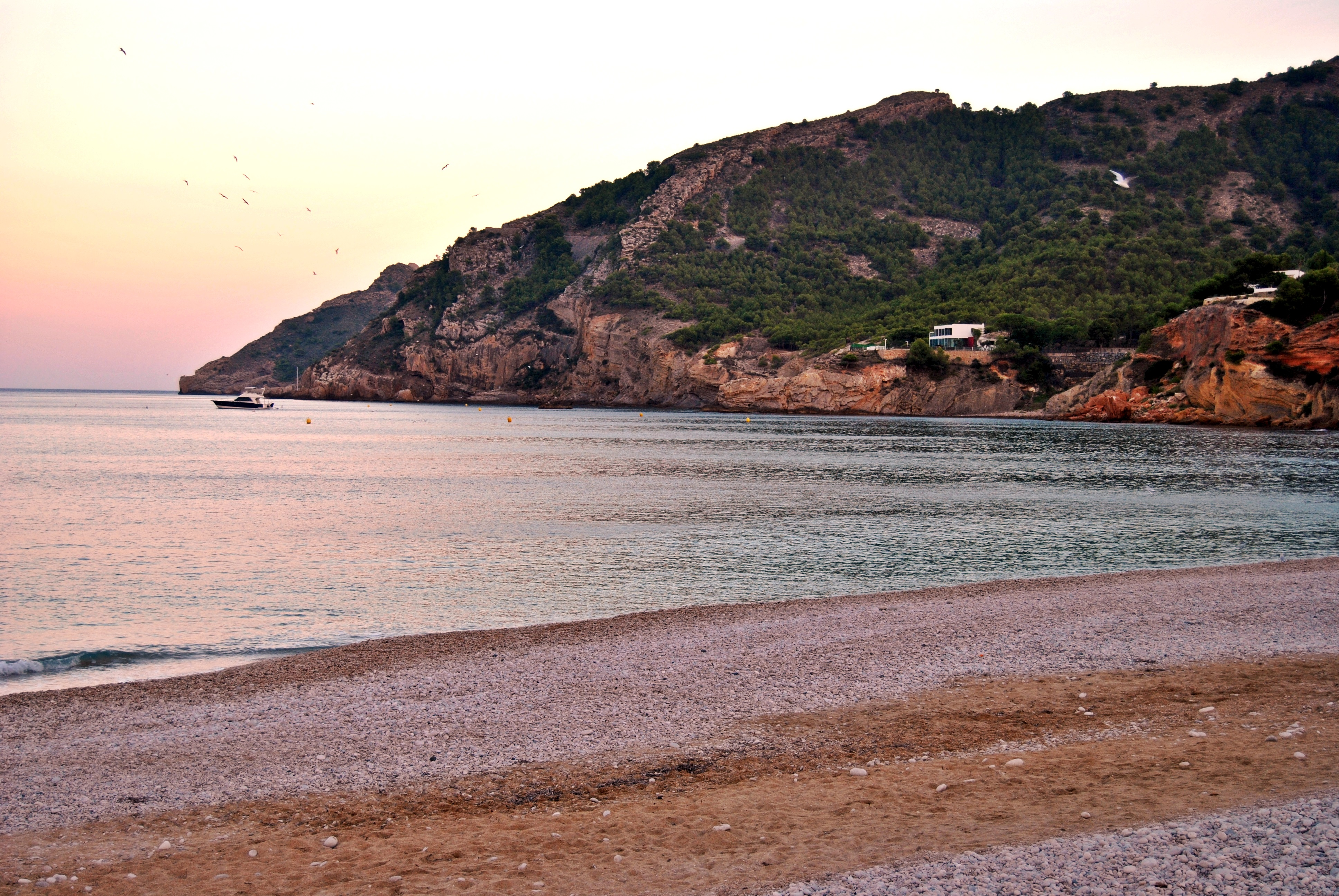 Playa del Albir en Alfaz del Pi (Alicante)